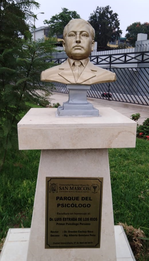 UNMSM Facultad de Psicologia - Busto de Luis Estrada de los Rios